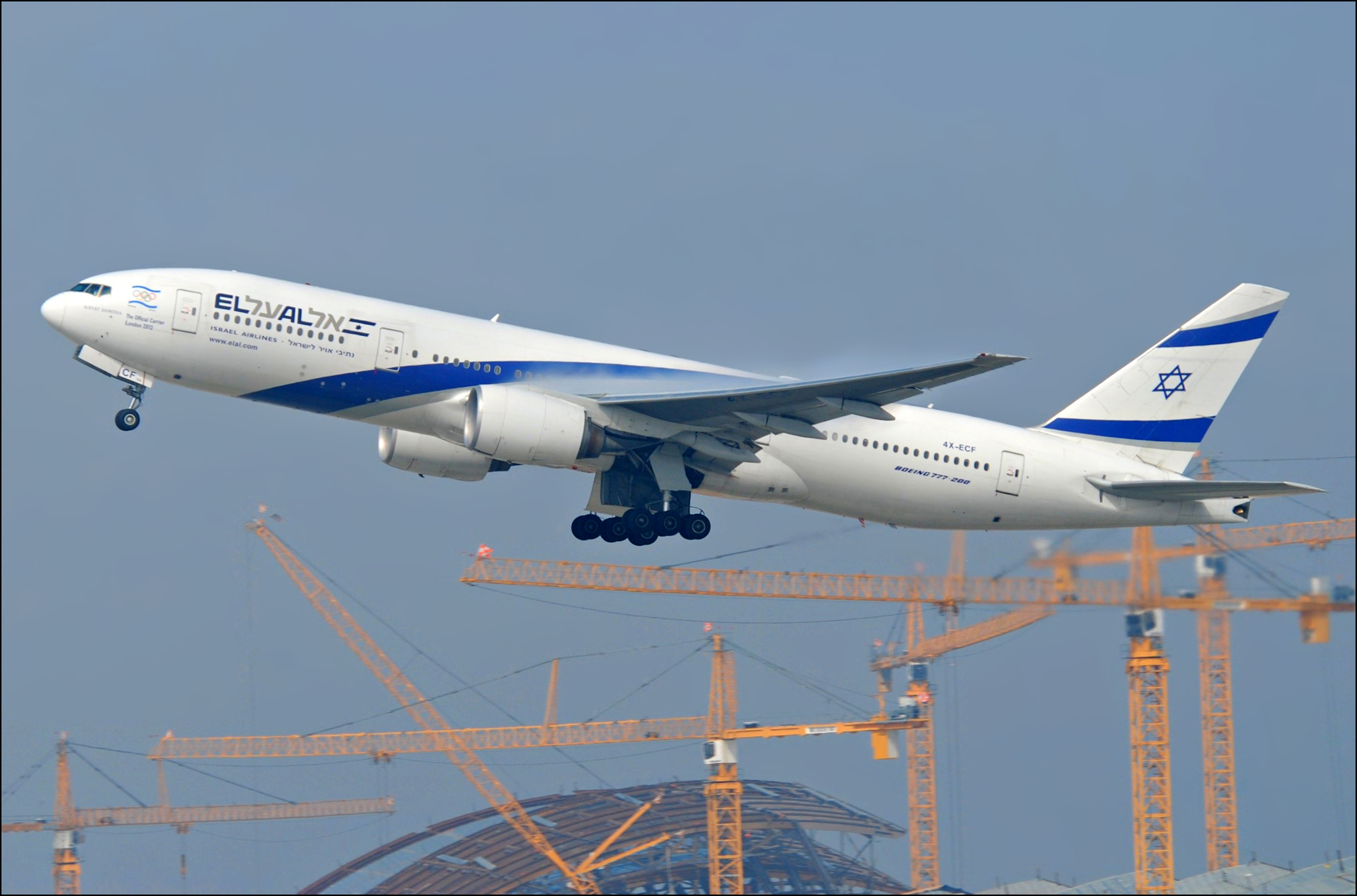 El Al Boeing 777-258ER; 4X-ECF@LAX;10.10.2011/622on